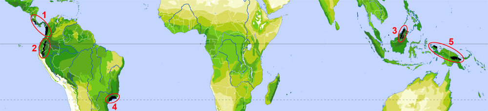 Zentren der größten Artenvielfalt (Megadiversität). Ableitung von der Karte Biodiversity-Zones (vascular plants).png